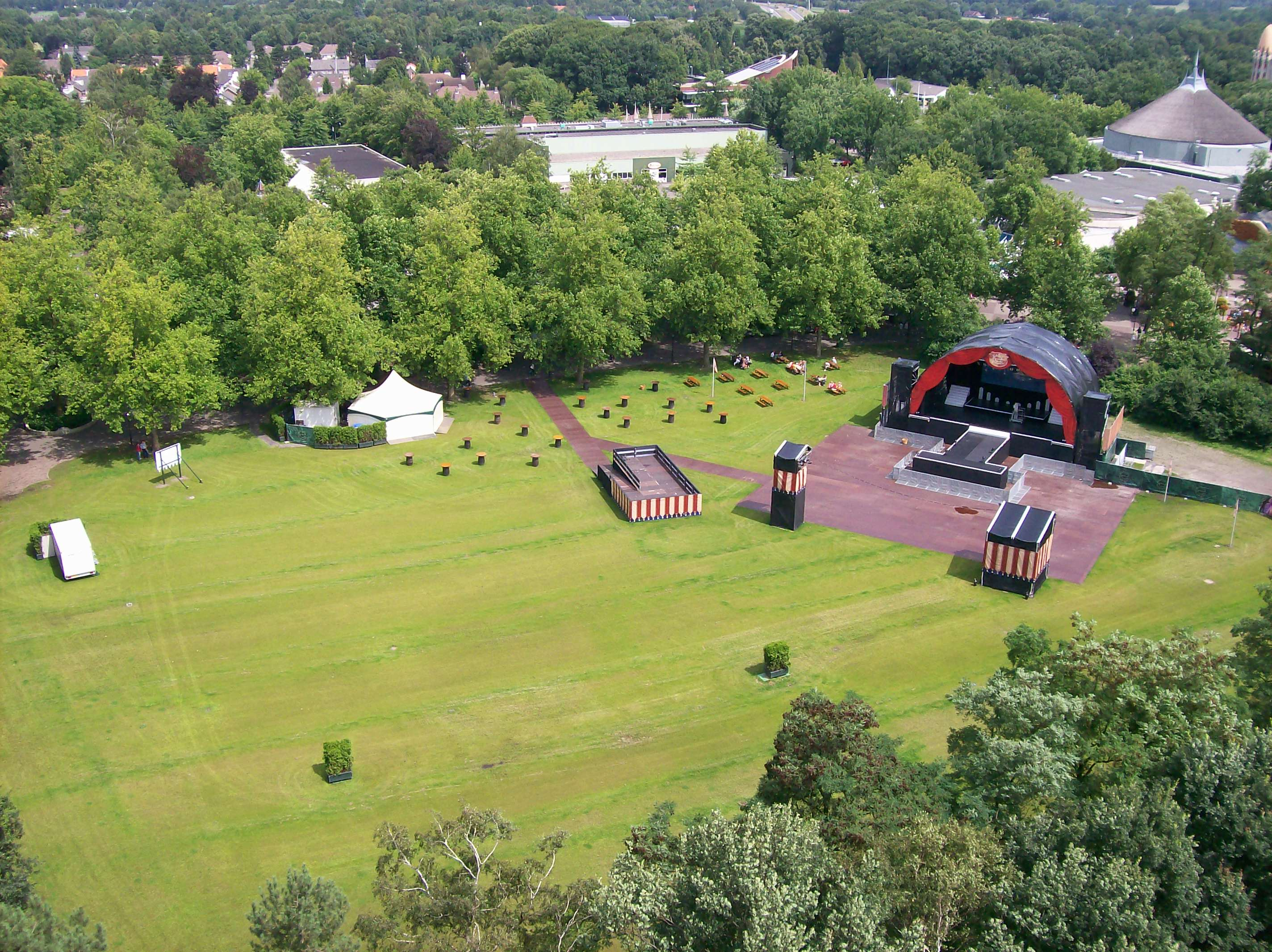 Speelweide lieu de concerts en plein air